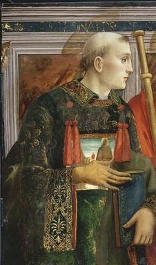 Saint Léonard (Saint Leonard)